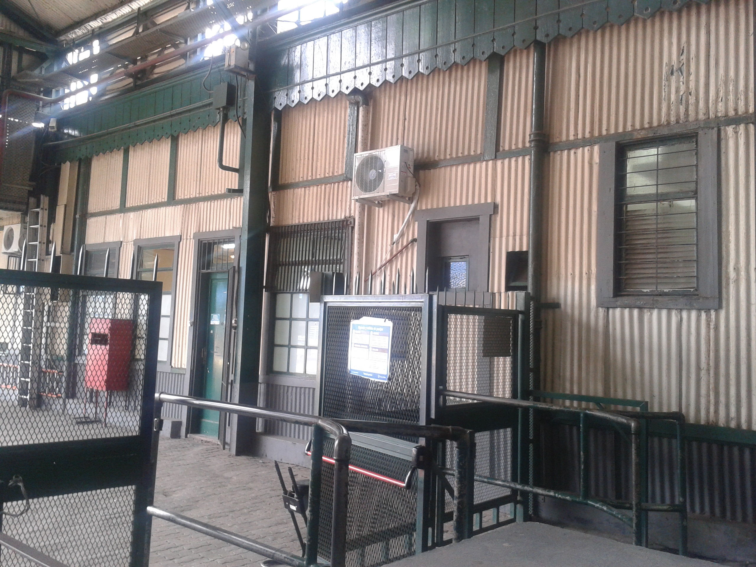 Ingreso a andén 5